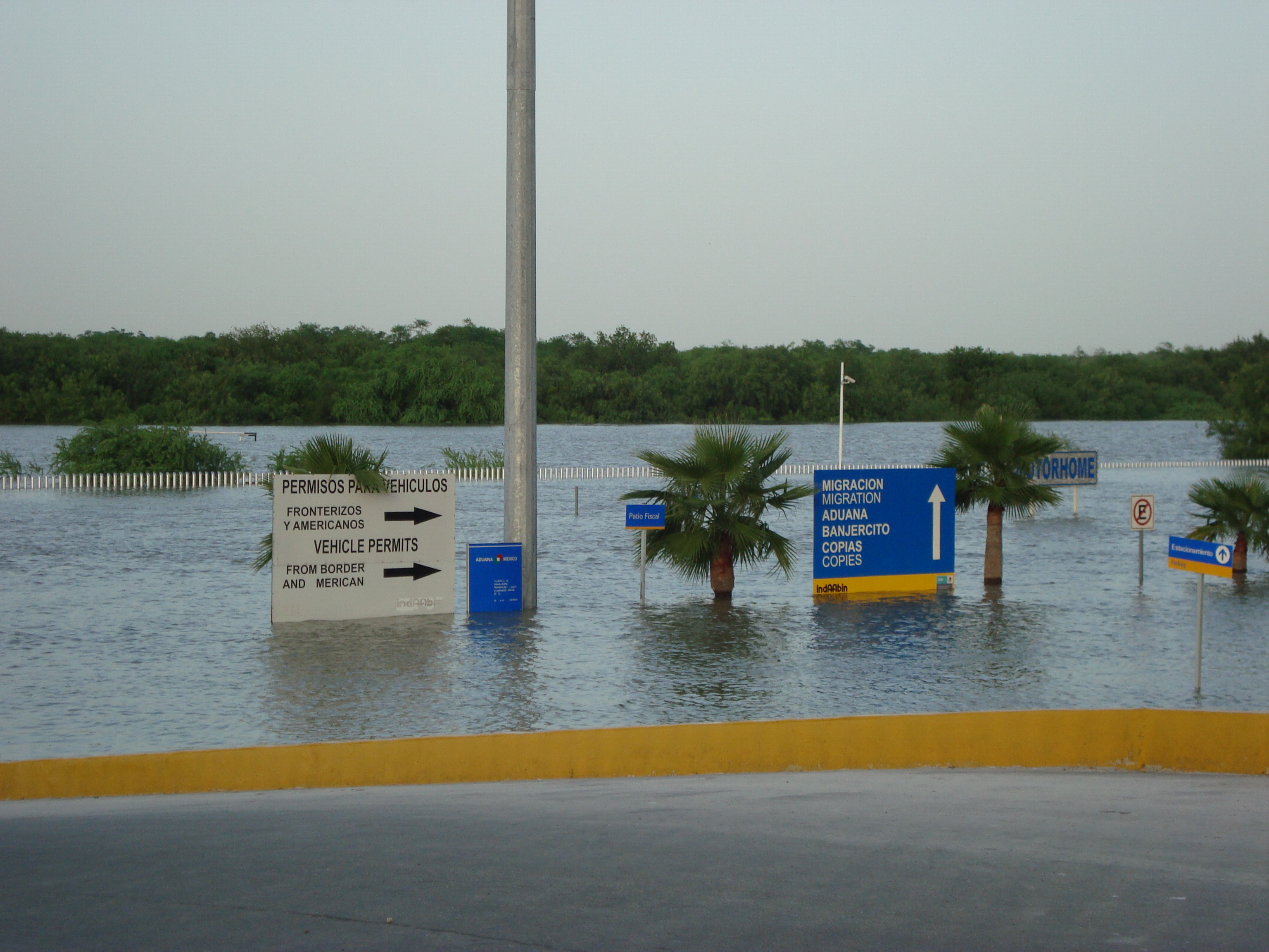 Hace unos años, cuando la lluvia azotó nuestra ciudad, nunca nos imaginamos que llegaríamos a este punto. Reynosa, se llenó de agua y pudimos ver un espectáculo como este, en el cuál, nuestra ciudad quedó practicamente bajo el agua. Aún asi, a pesar de todos los incovenientes, salimos adelante, como reynosenses que somos. ¡Reynosa, ciudad de guerreros...!